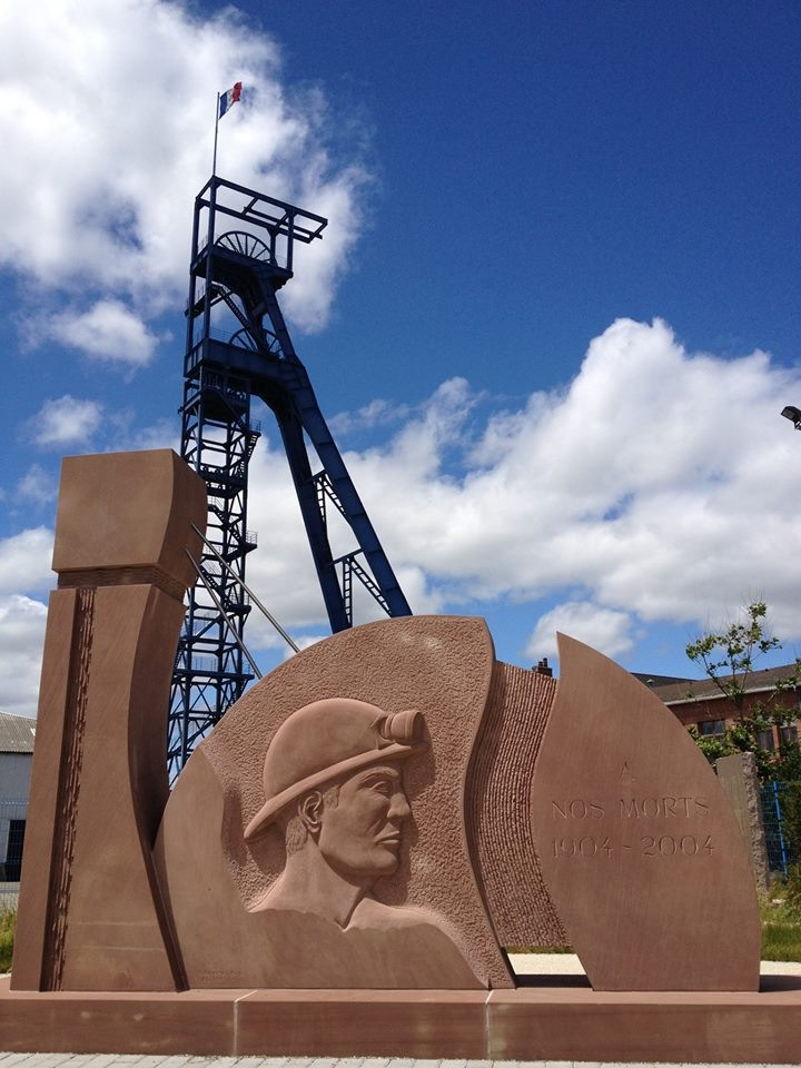 Le mémorial rassemble les noms de plus de 800 victimes d'accidents mortels survenus dans les mines de potasse d'Alsace. Vous pouvez visiter ce mémorial tous les jours. Photo offerte par